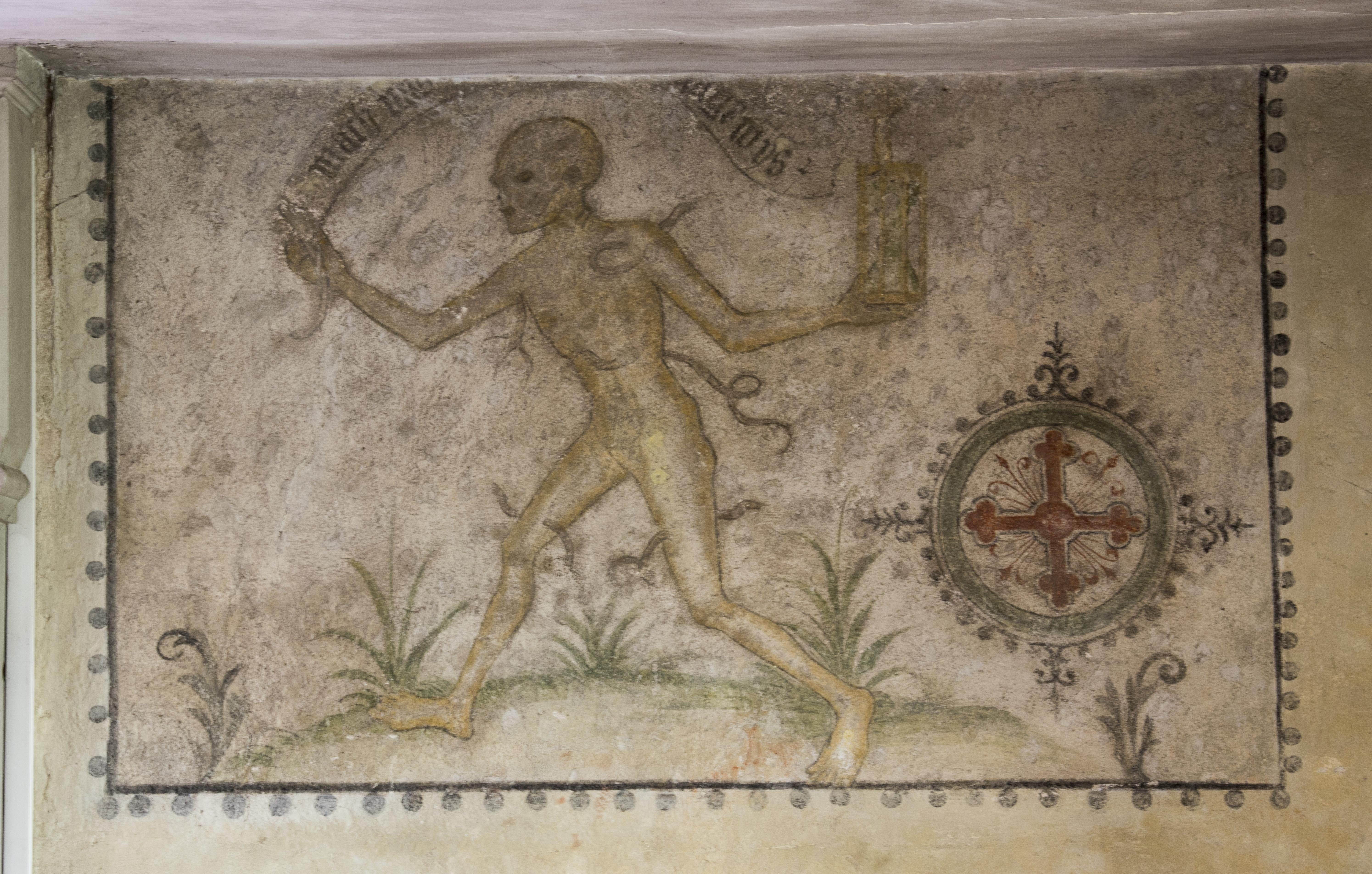 Bilder von der Bühlwegkapelle in Ortenberg